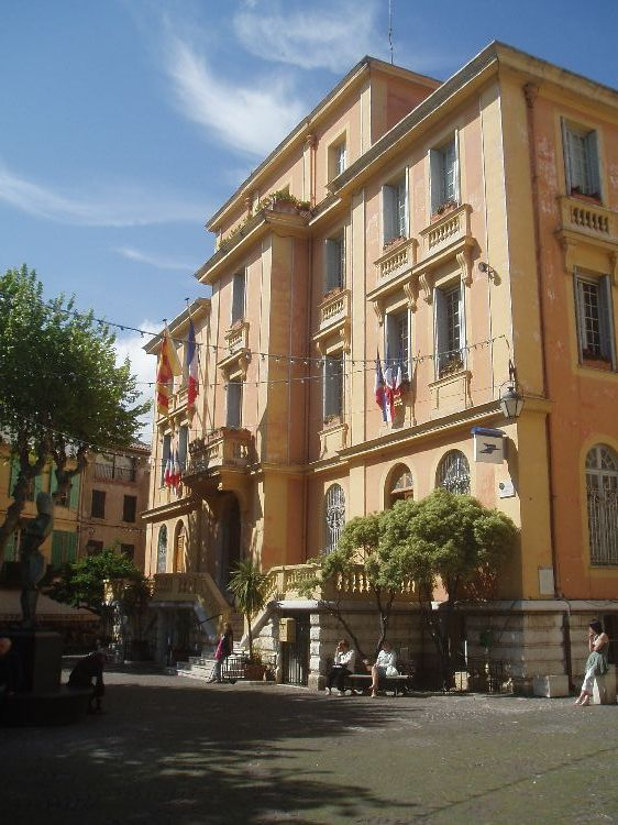 Rådhuset i Vence